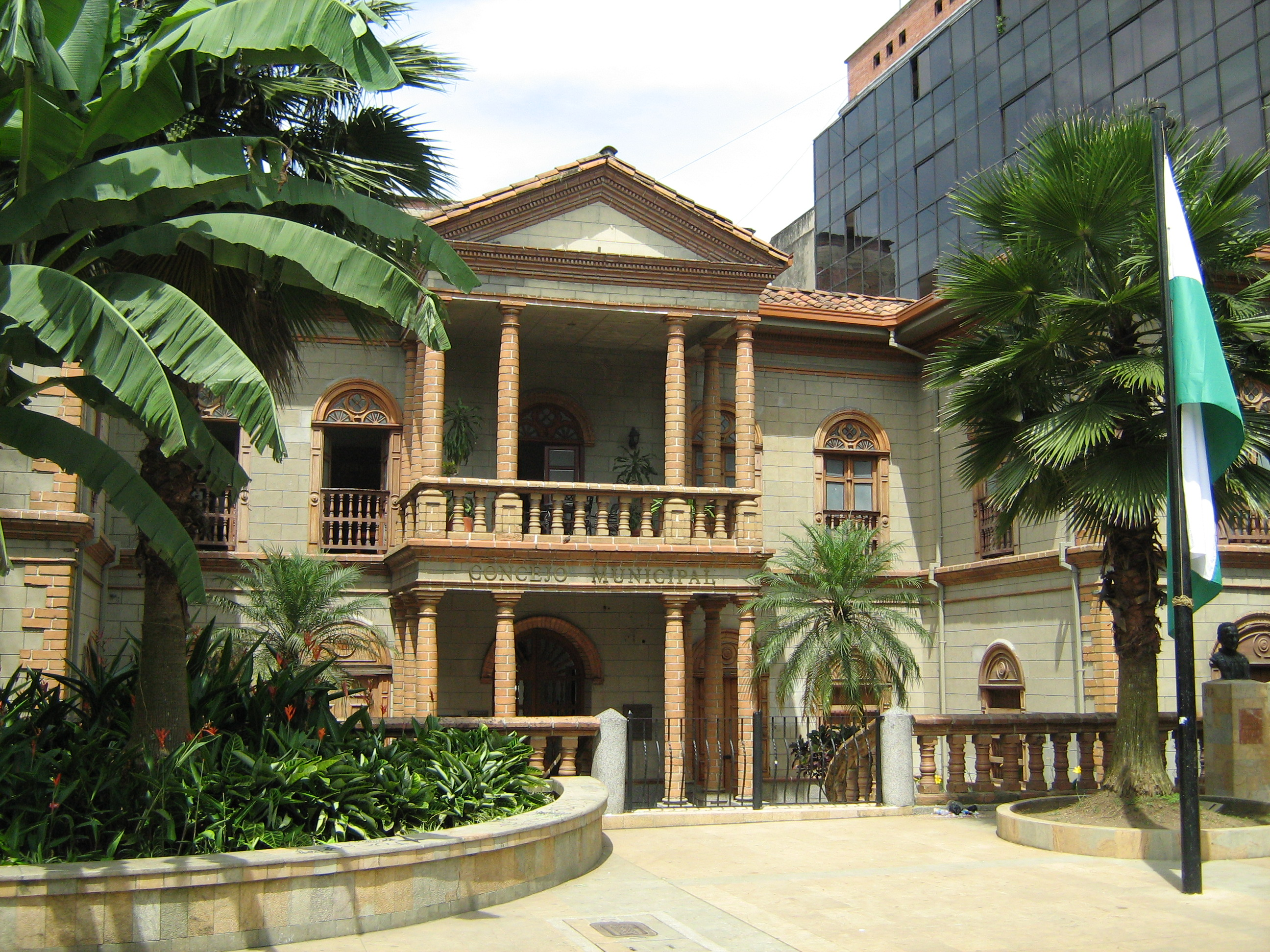 Edificio del Concejo Municipal de Envigado, Colombia.